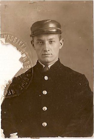 Mijn grootvader (1897-1982), hier in het stokersuniform van de HIJSM (Hollandsche IJzeren Spoorweg-Maatschappij) Later was hij de machinist op de beroemde 3737 stoomloc. Loc 3737 "Oude Dame" was de laatste stoomloc die officieel dienst deed bij de NS, en reed op 8 januari 1958 haar laatste rit en werd toen opgeborgen in Het Spoorwegmuseum Nu ben ik op zoek naar info en foto's (1958 en ouder) wat betreft mijn grootvader werkzaam bij het spoor. Ik weet dat er een foto is van een loc waarbij mijn grootvader uit het raam hangt, deze heb ik als kind in een boek zien staan, deze foto zoek ik in het bijzonder. Ruim 30 jaar geleden met mijn grootvader in het spoorwegmuseum geweest, bij de 3737 stond hij met tranen in zijn ogen, het was zijn loc. Ik zal een jaar of 10 zijn geweest maar herinner mij dat heel goed. Ook ben ik op zoek naar spoor gerelateerde info van mijn overgrootvader Wilhelmus Ludovicus Koster (1872-1947) eveneens machinist bij de HIJSM. Schoonvader van Matthijs van Zetten. (machinist nr. 139 of 220) stamboom